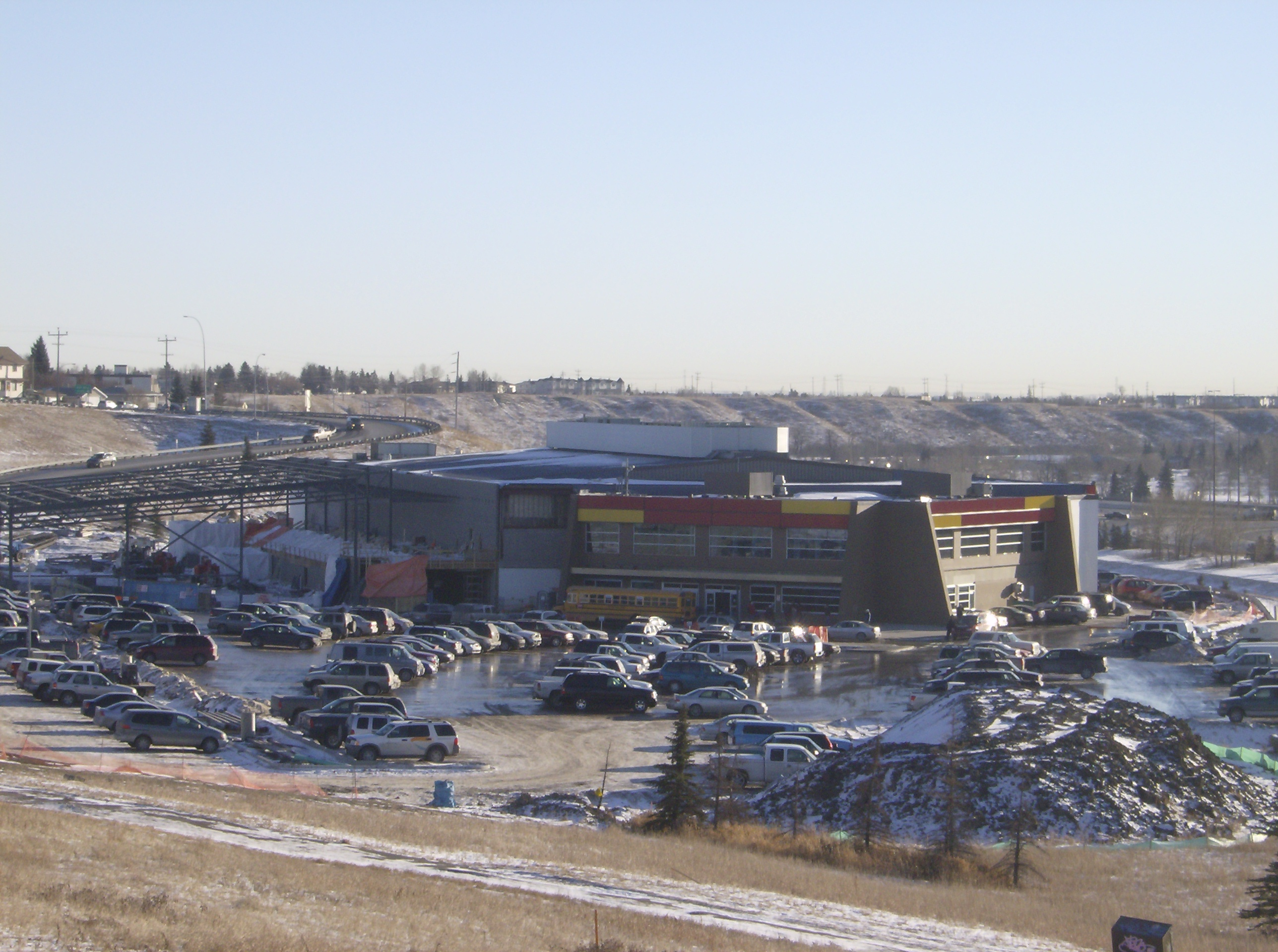 Max Bell Centre in Calgary, Alberta, Canada.